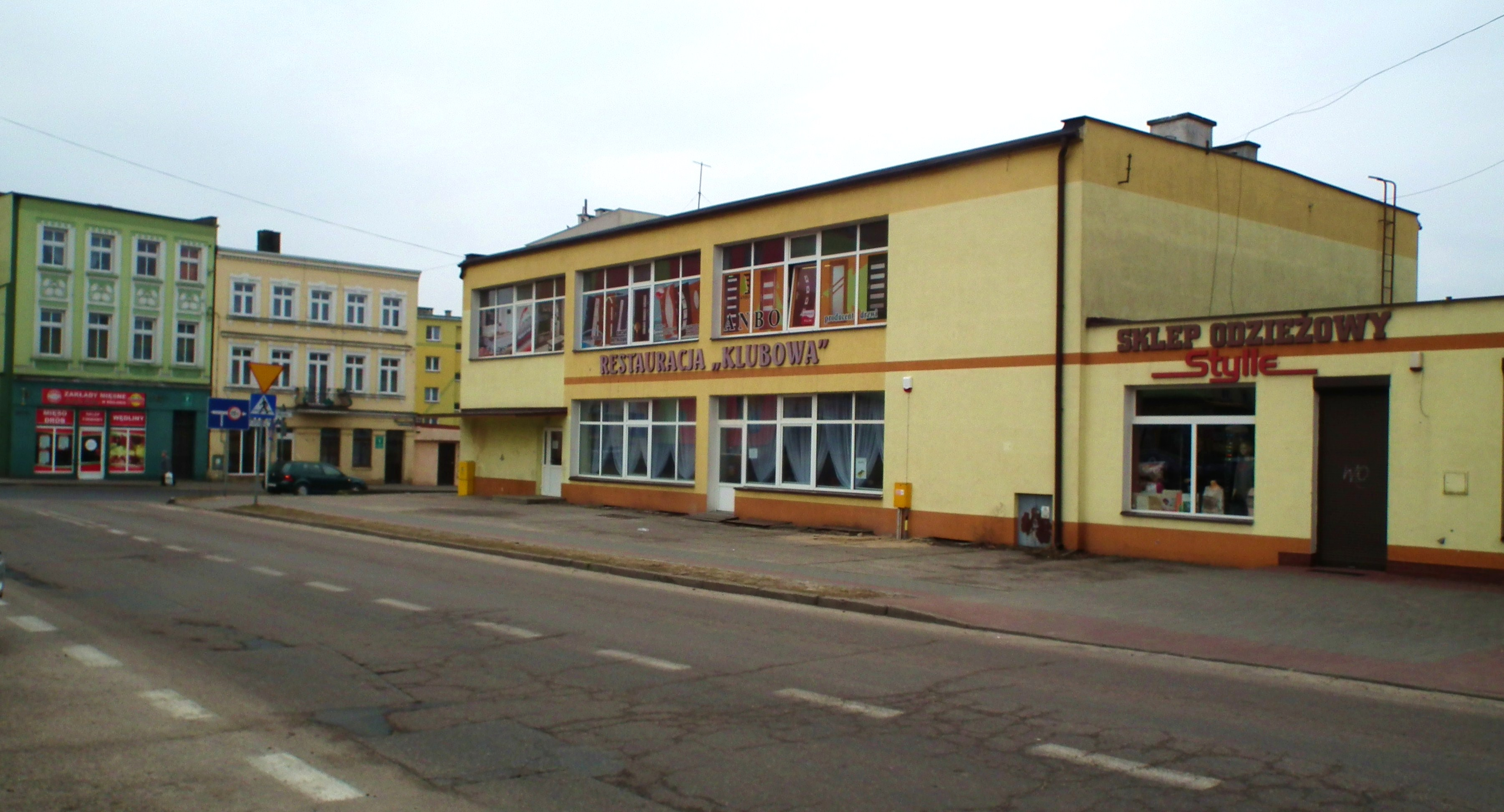 Rynek w Czarnem.